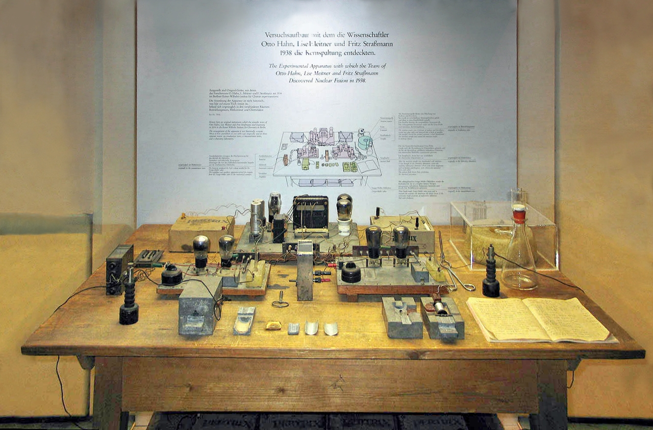 Versuchsapparaturen, mit denen Otto Hahn, Lise Meitner und Fritz Straßmann von 1935 bis 1938 nach Transuranen suchten, und Otto Hahn und sein Assistent Fritz Straßmann am 17. Dezember 1938 die Kernspaltung entdeckten. Deutsches Museum, München.